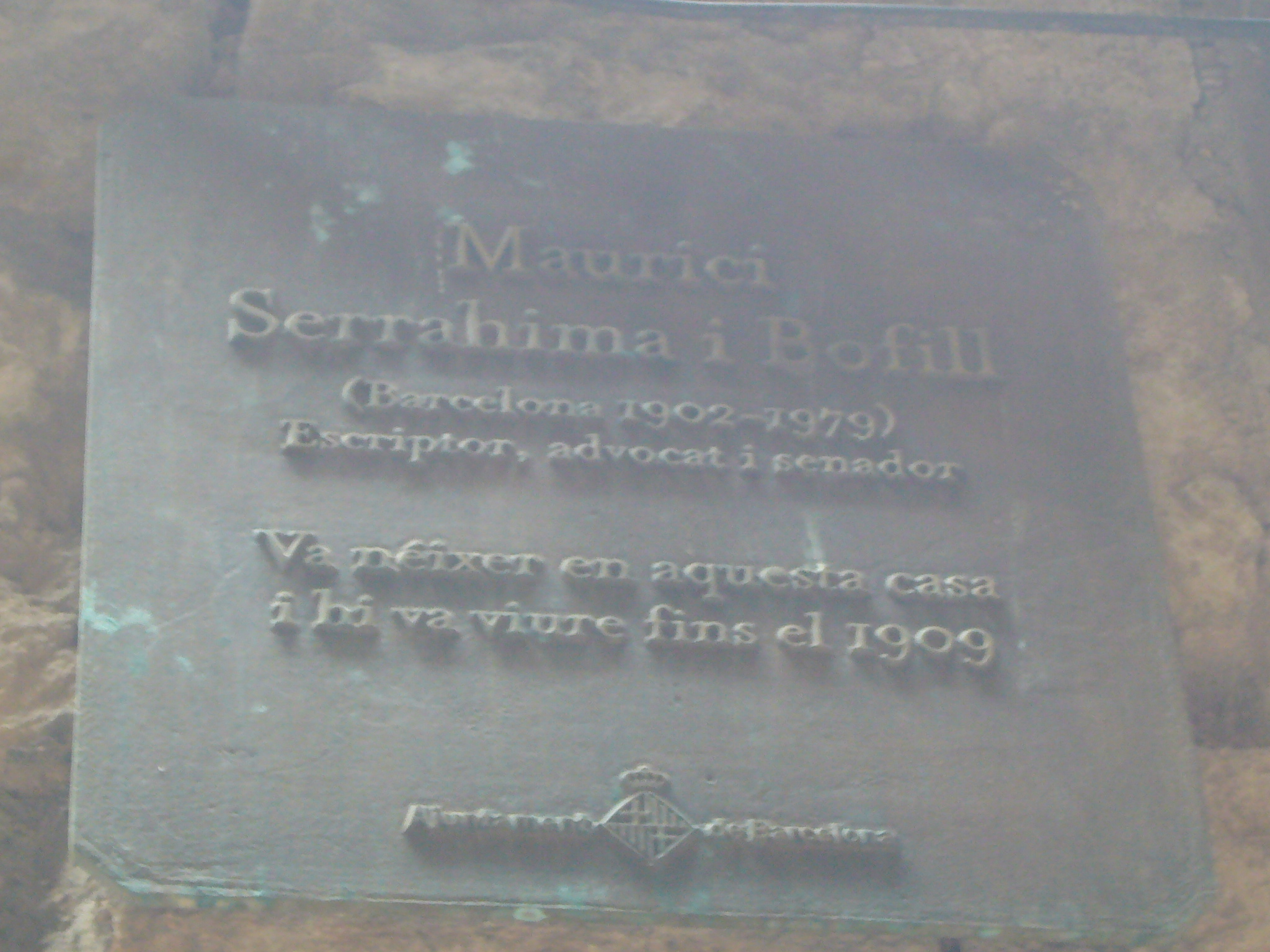 Carrer Petritxol num 3 - Casa on Maurici Serrahima i Bofill va néixer i on va viure fins el 1909